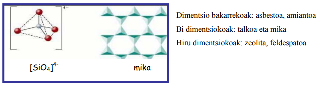 Silikatoen egiturak